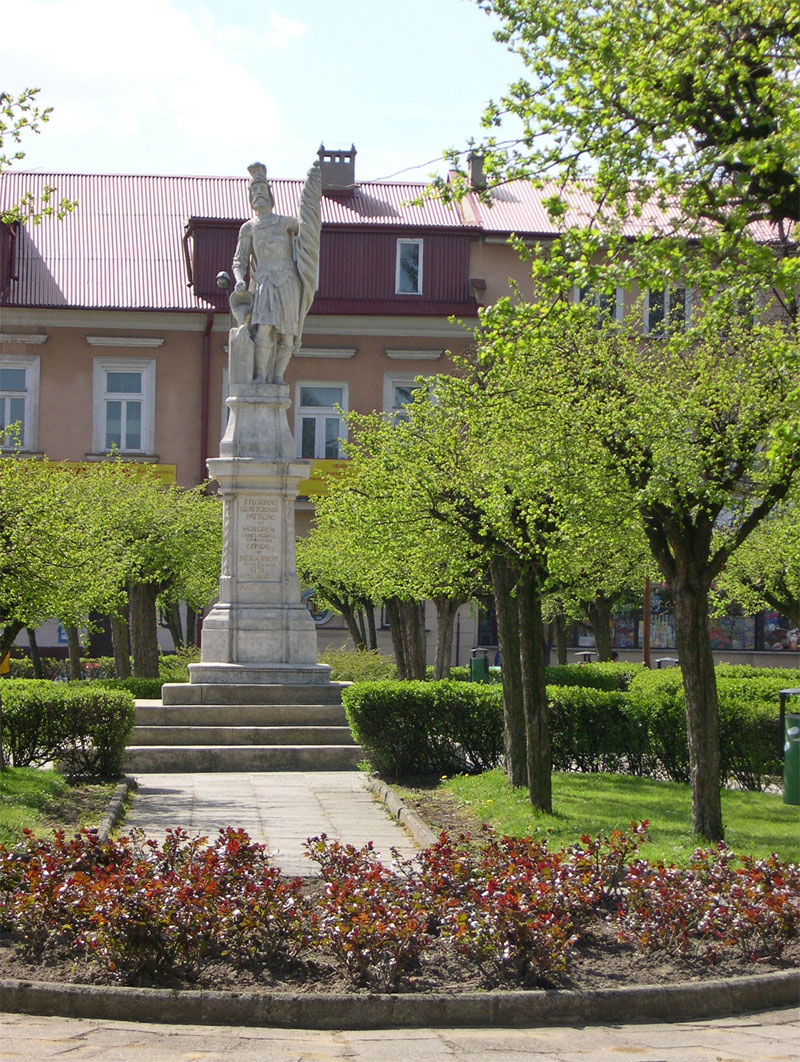 pomnik św. Floriana w Brzesku